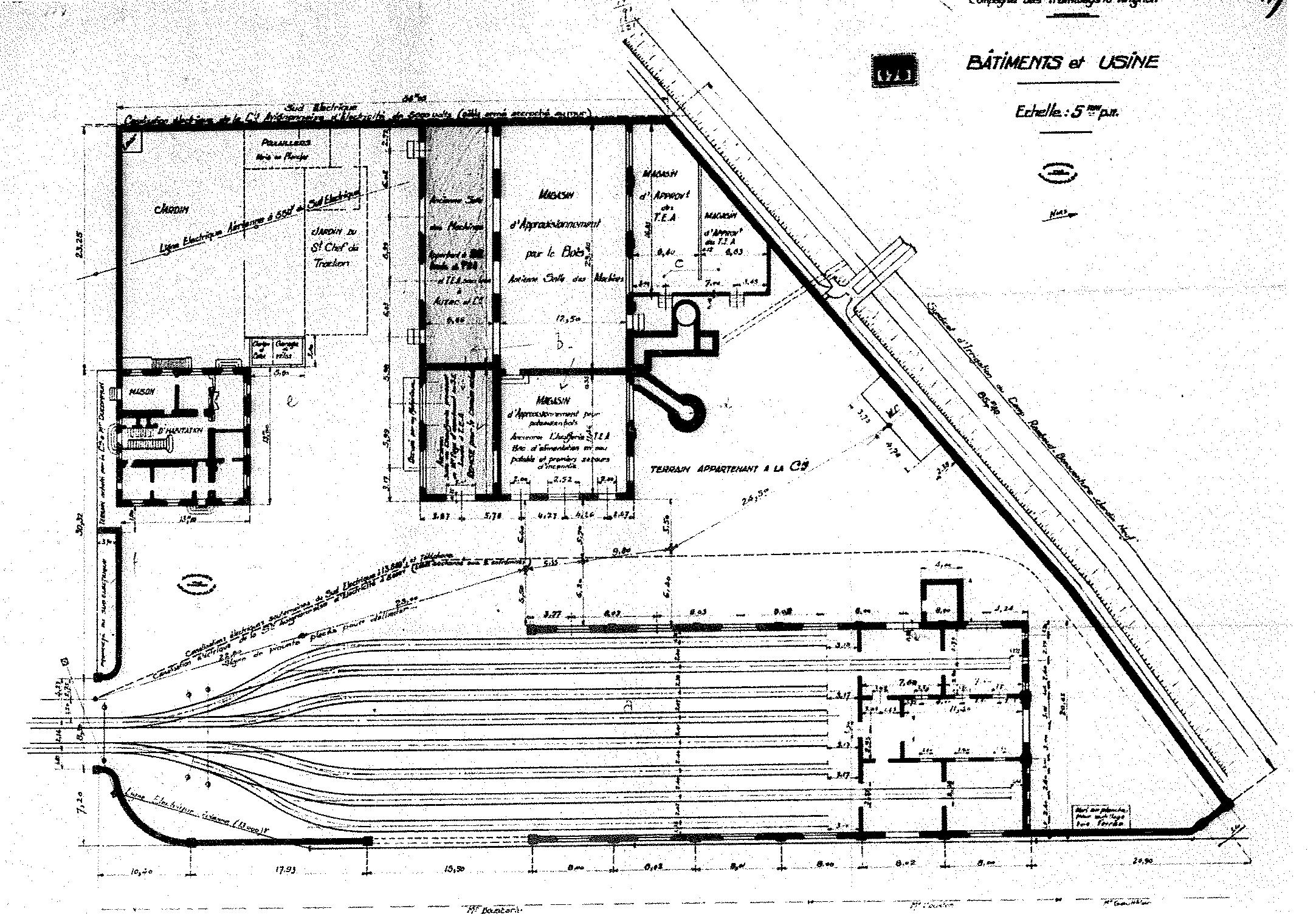 Plan du dépot des tramways d'avignon